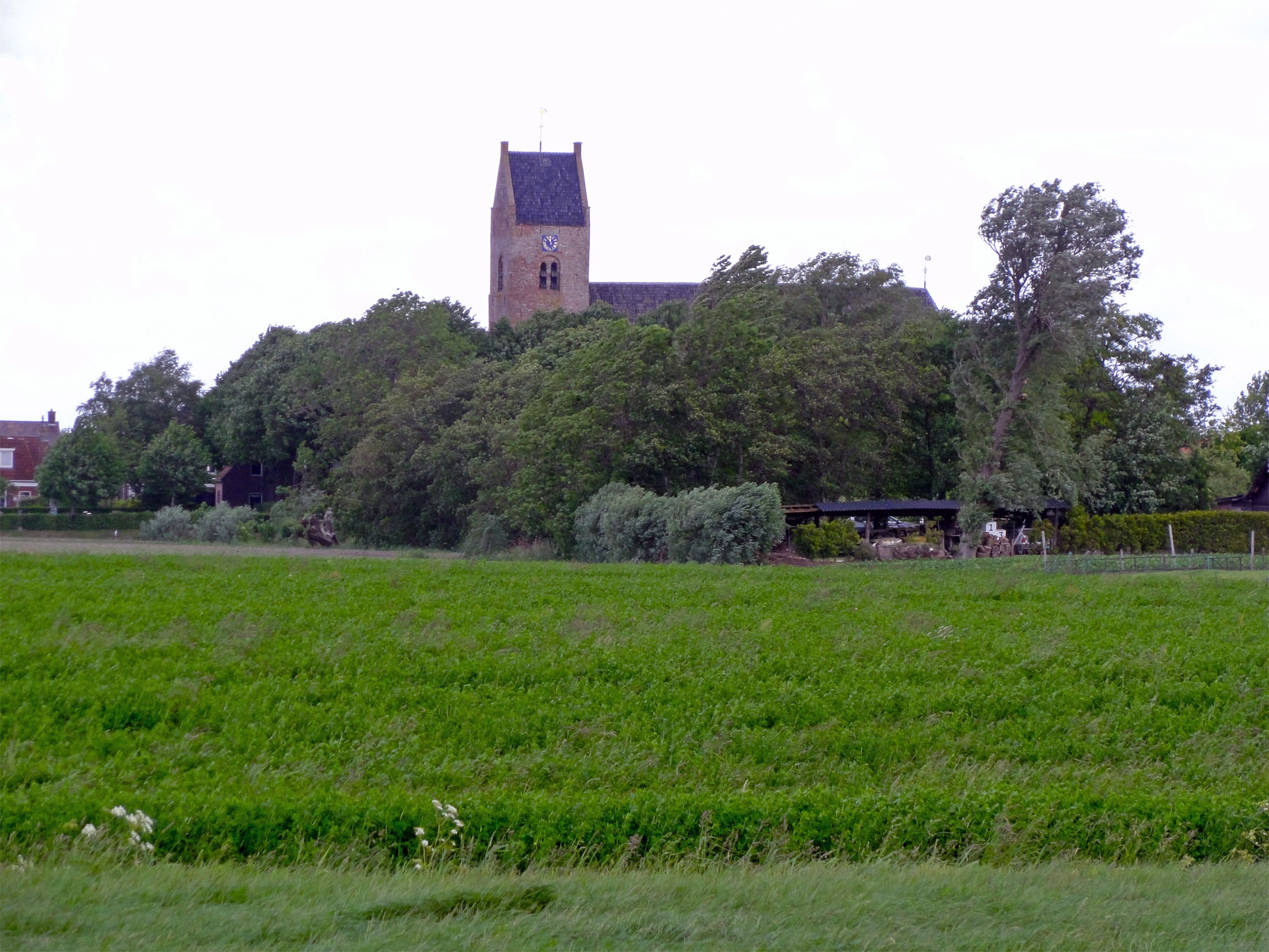 Zicht op Blija met Sint-Nicolaaskerk vanuit het zuidwesten